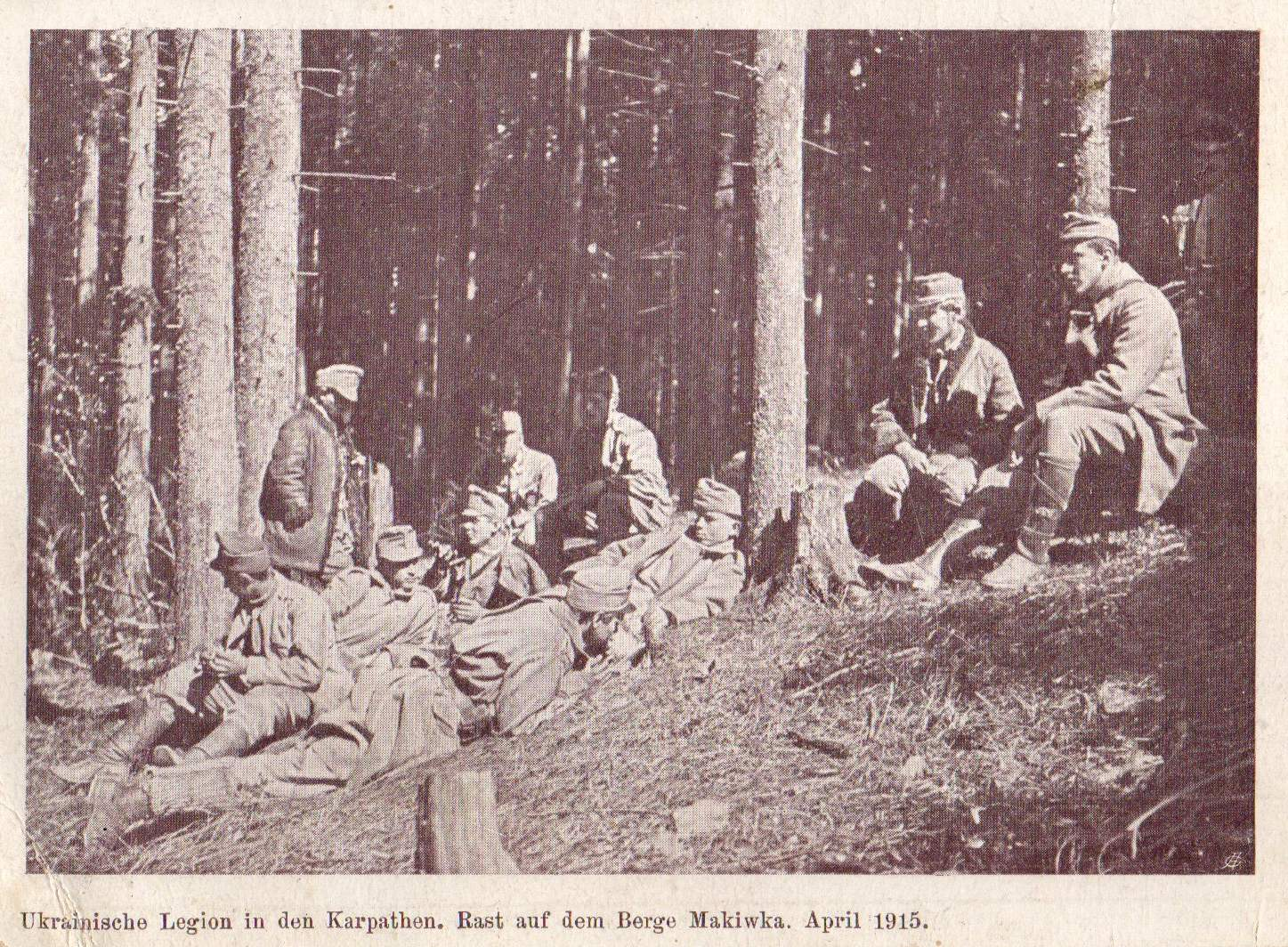 бійці УСС, квітень 1915р. (фондова збірка, Мейл-Арт Музей, м.Львів)